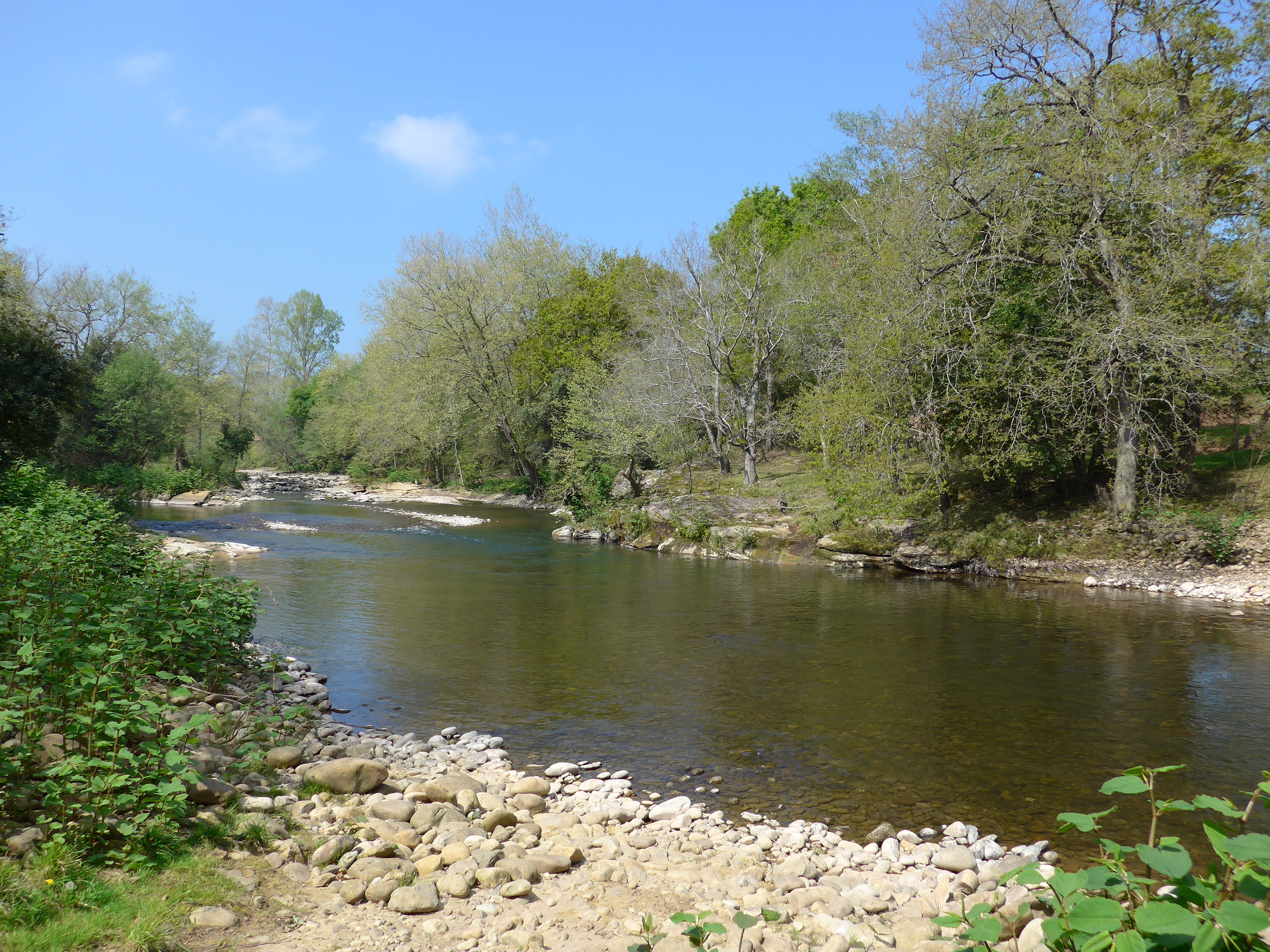 El río Saja a su paso por Villapresente (Reocín, Cantabria).